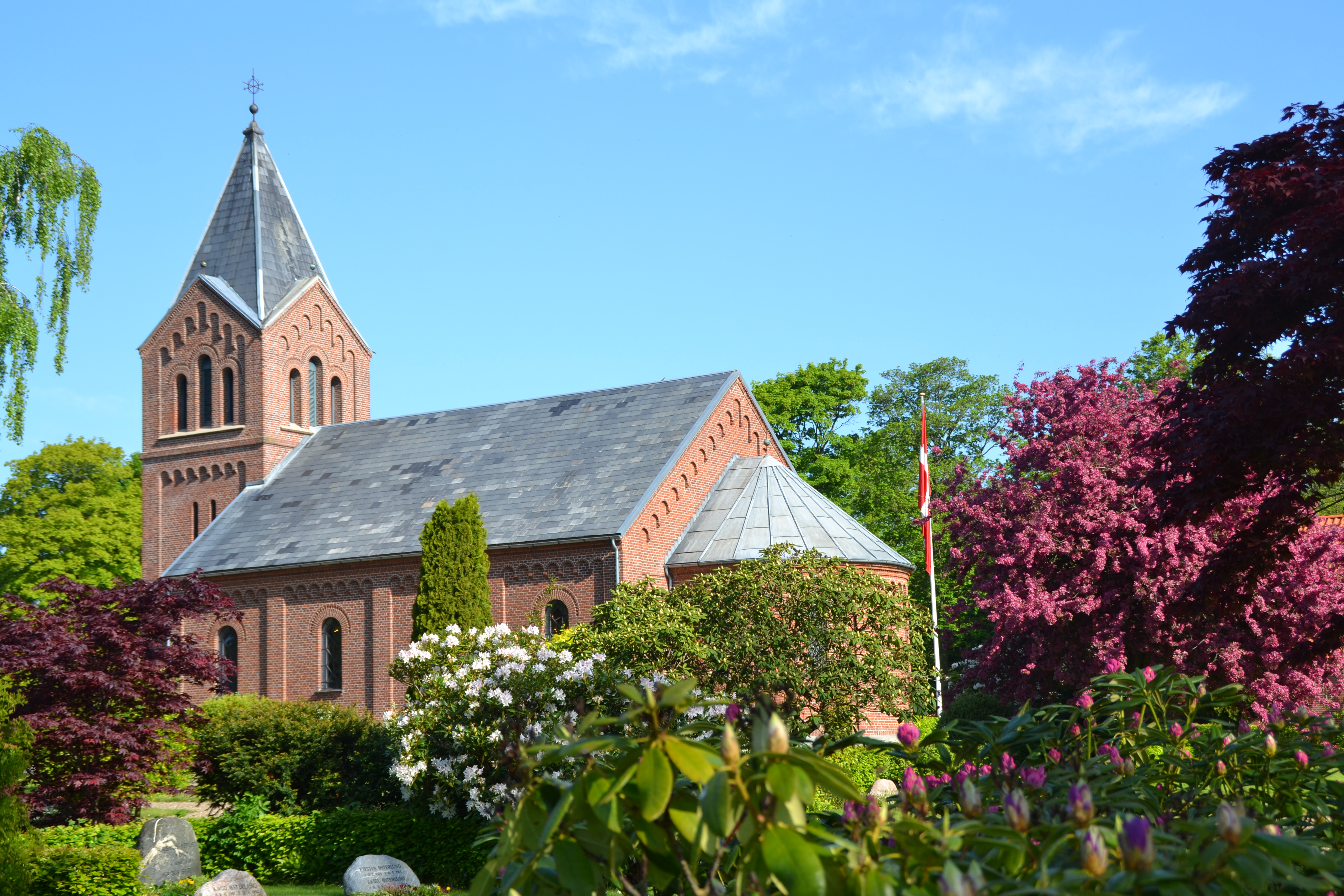 Ågård Frimenighedskirke opført 1887